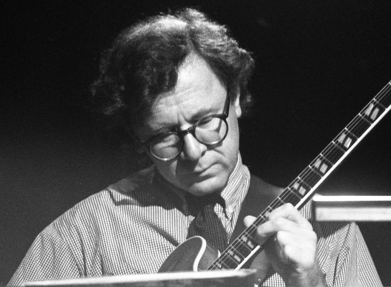 Volker Kriegel (United Jazz + Rock Ensemble), 23.11.1992, Braunschweig, Jolly Joker